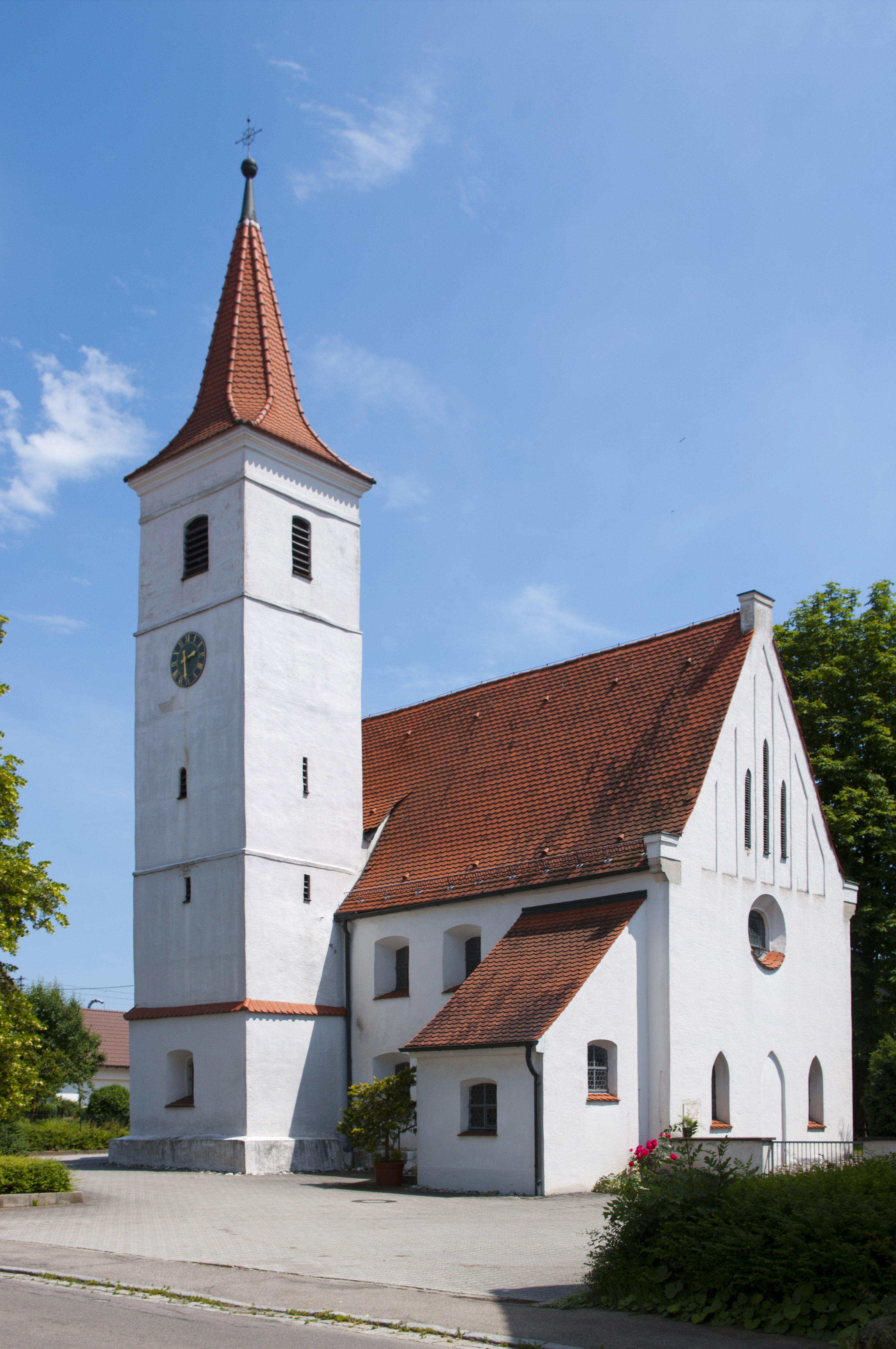 Erbaut 1470, barockisiert 1620/30, Turm 1799